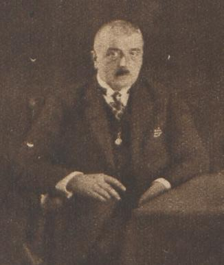 In de vergadering der Vereeniging van Burgemeesters en secretarissen in de provincie Zuid-Holland", Zaterdag alhier gehouden is onze nieuwe burgemeester, Mr. Dr. J. Wijteman als voorzitter geïnstalleerd. Hierboven het bestuur der vereeniging, zooals dat nu is saamgesteld. Van links naar rechts: F. S. G. Bos, burgemeester van Zoetermeer en Zegwaart; Ulbo J. Mijs, burgemeester van Gouda; Jac. van Waning, burgemeester van Ouderkerk a.d. IJssel; Mr. Dr. J. Wijteman, burgemeester van Rotterdam (voorzitter); F. Lamaison van Heenvliet (secretaris) en Pruis, burgemeester van Vlaardingen.